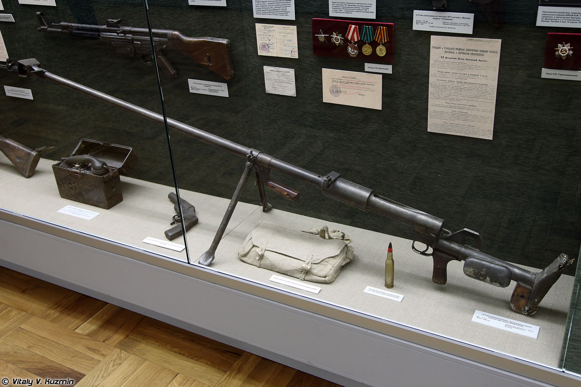 Противотанковое однозарядное ружьё образца 1941 года системы Дегтярёва (ПТРД)